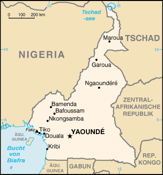 Karte von Kamerun